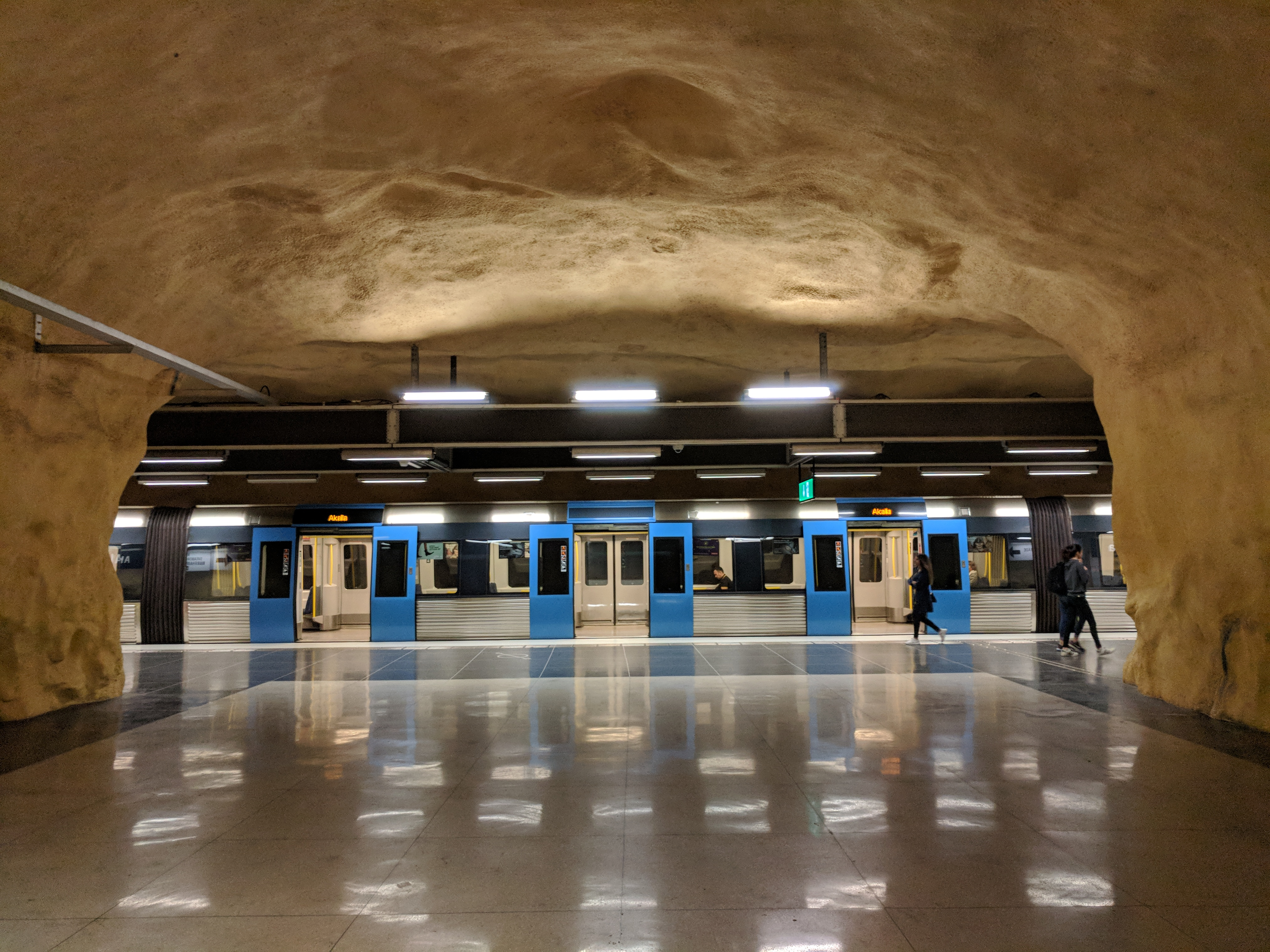 Akalla tunnelbana